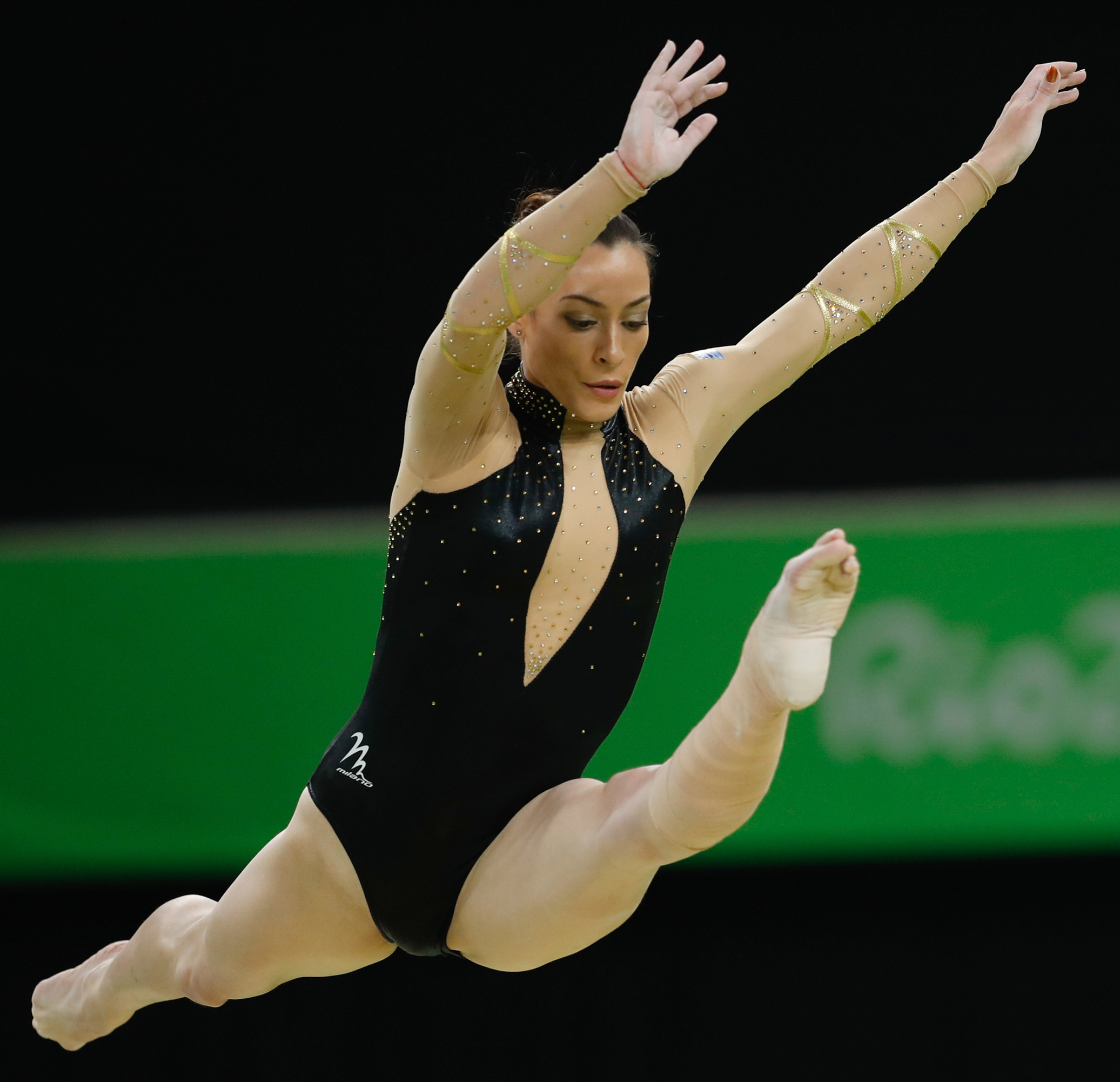 Rio de Janeiro - Ginasta da Romênia Catalina Ponor termina final por aparelhos da trave na 7ª posição (Fernando Frazão/Agência Brasil)